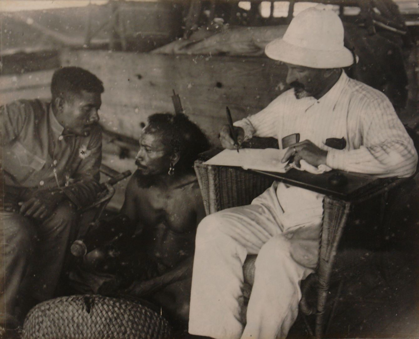 Augustin Krämer auf einer Forschungsreise auf die Palau-Inseln im westlichen Pazifik.